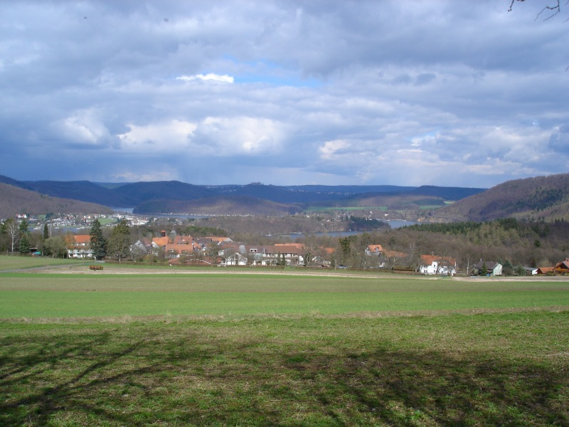 Blick vom „Fünfseenblick“ auf Bringhausen und den Edersee